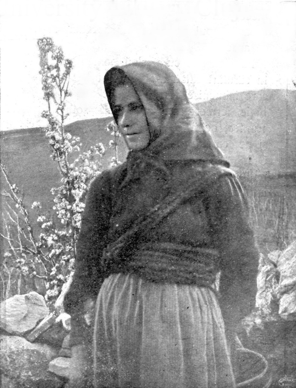 Girl from Șușnievița